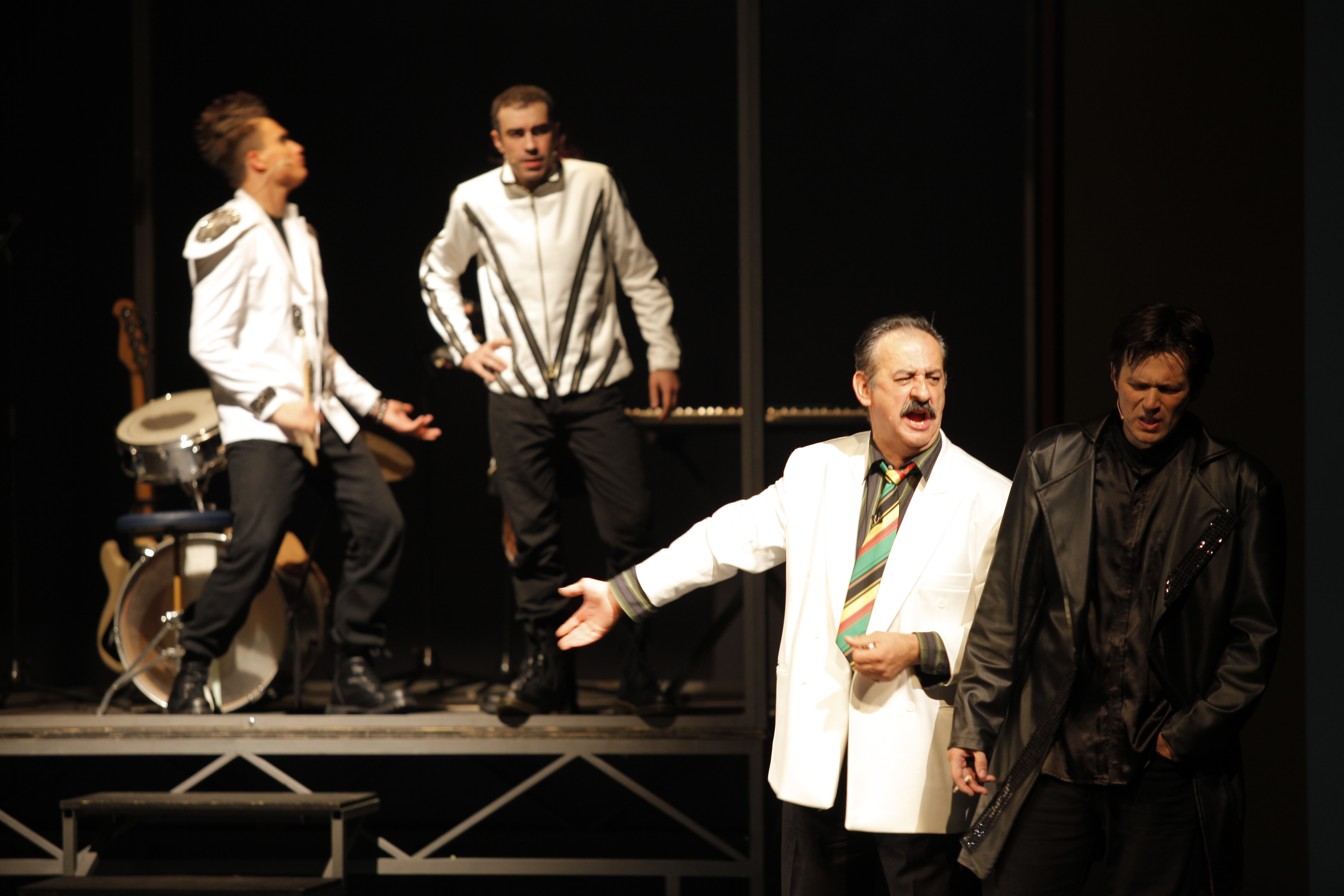 Premijera predstave "Glavo luda"